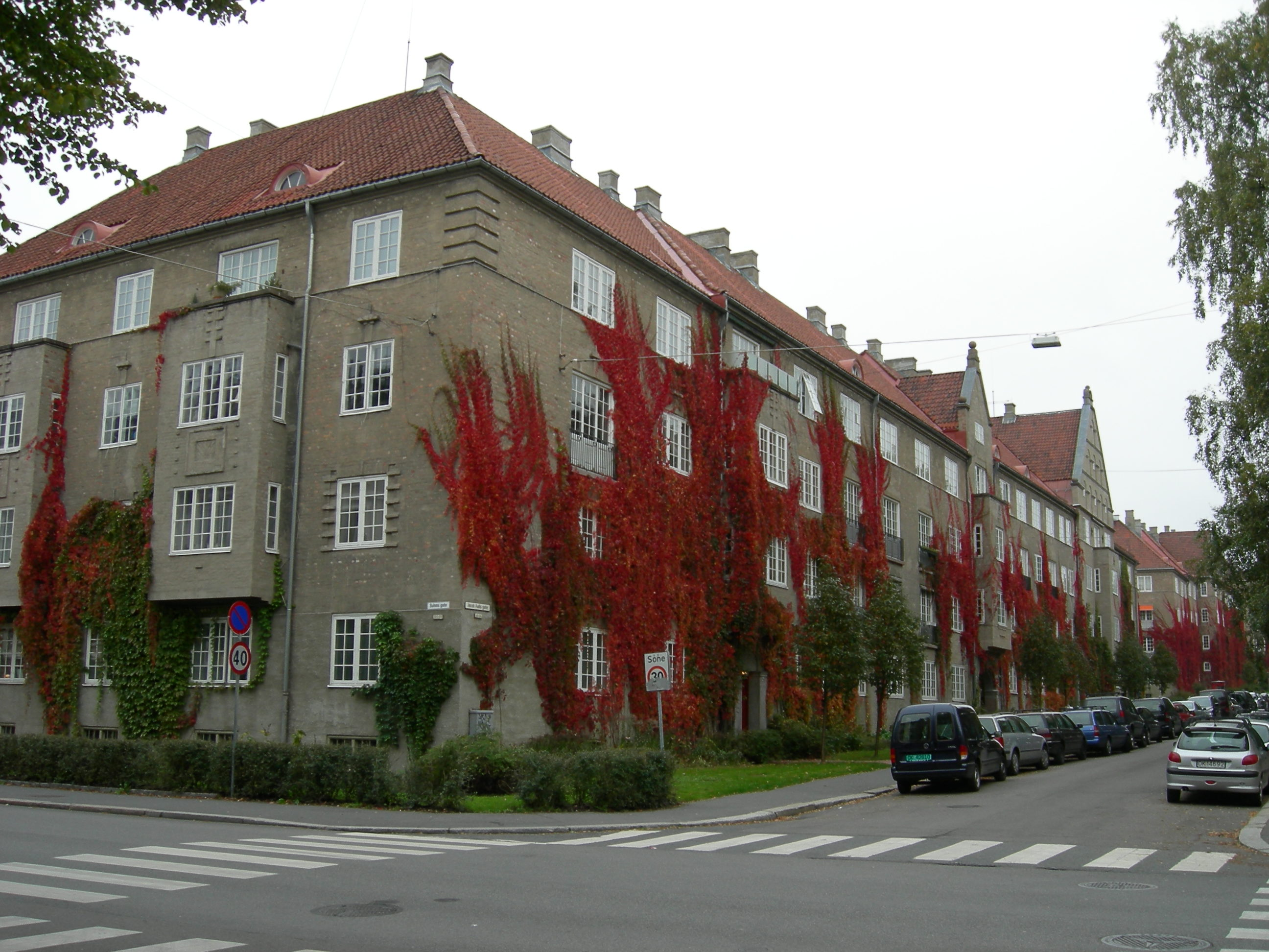 Jessenløkken på Fagerborg i Oslo, nordisk nybarokk bygget 1919-1922, sett fra krysset Suhms gate - Jacob Aalls gate.